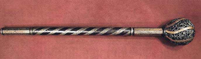 Булава гетьмана Пилипа Орлика, XVIII ст. Публічна бібліотека міста Лінчопінг